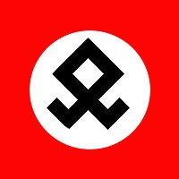 Immagine creata da Urbokant tramite il programma grafico "The Gimp". è comunque il logo di Avanguardia Nazionale, un'organizzazione italiana dichiarata illegale e disciolta nel 1976, il cui copyright non esiste. Italian far-rightist symbol with modified "Odal" rune"